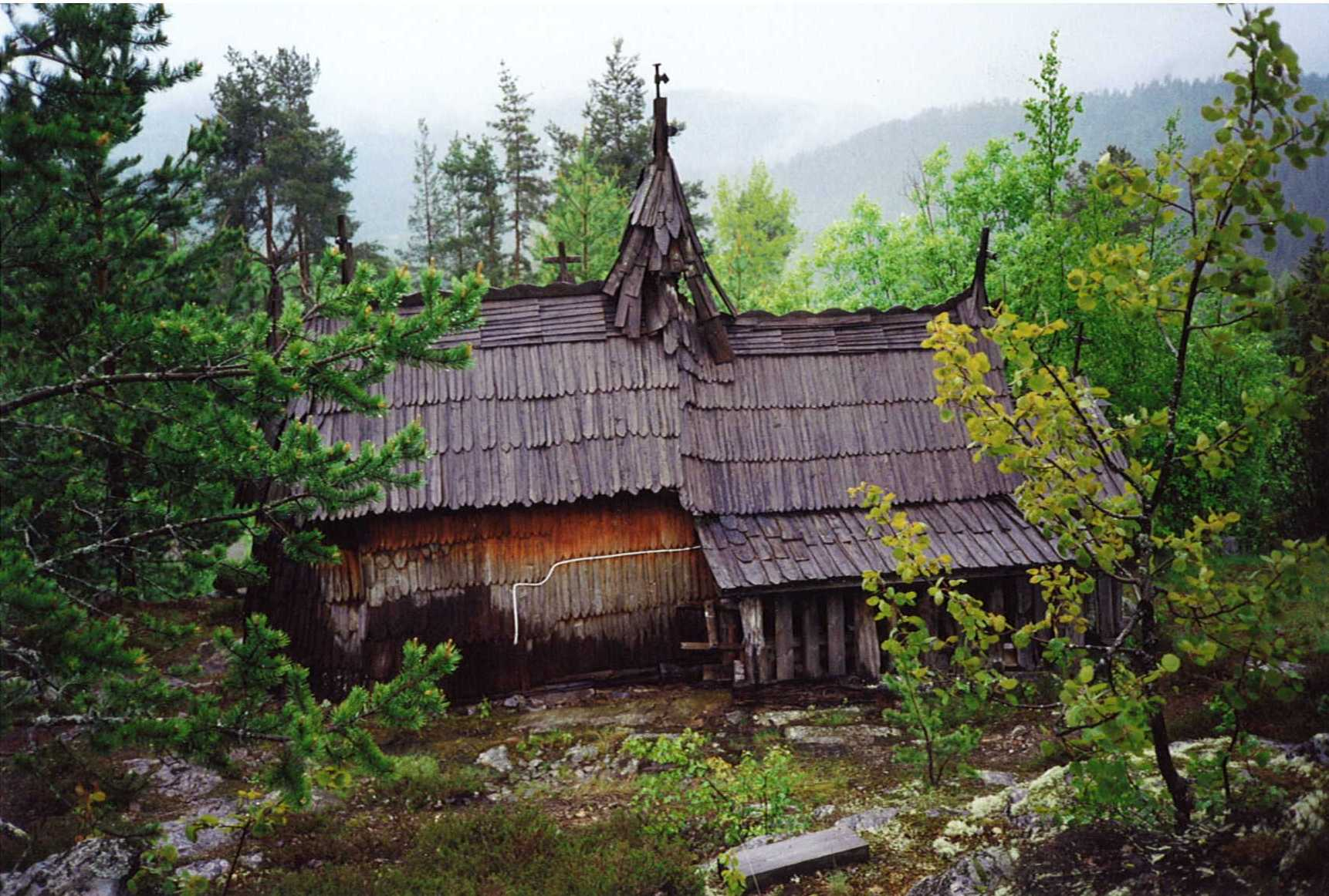 Endrekirken sett fra siden